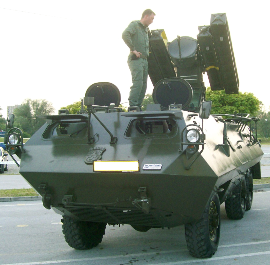 Strijela - 10CROA1